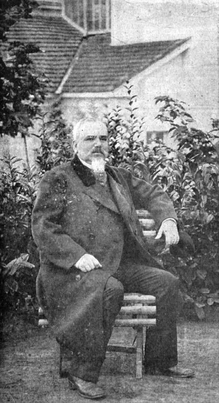 Fotografía de Arsenio Martínez Campos.